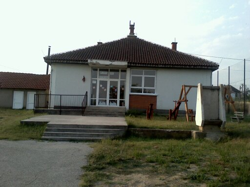 Osnovna škola „Sveti Sava“ u Dobrovodici.